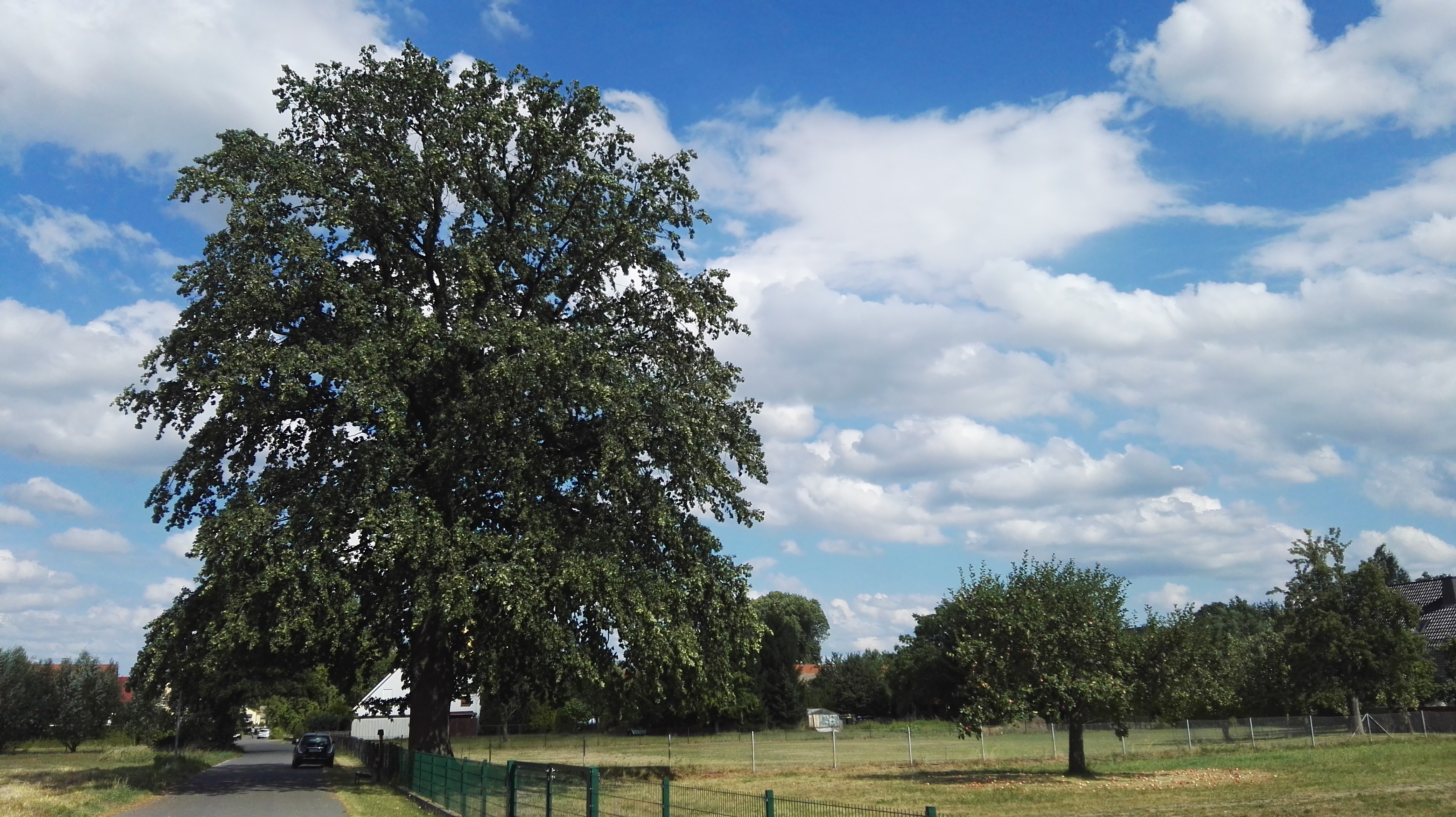 als Naturdenkmal (1108-3) geschützte Stieleiche in der Dorfstraße in Kroppen